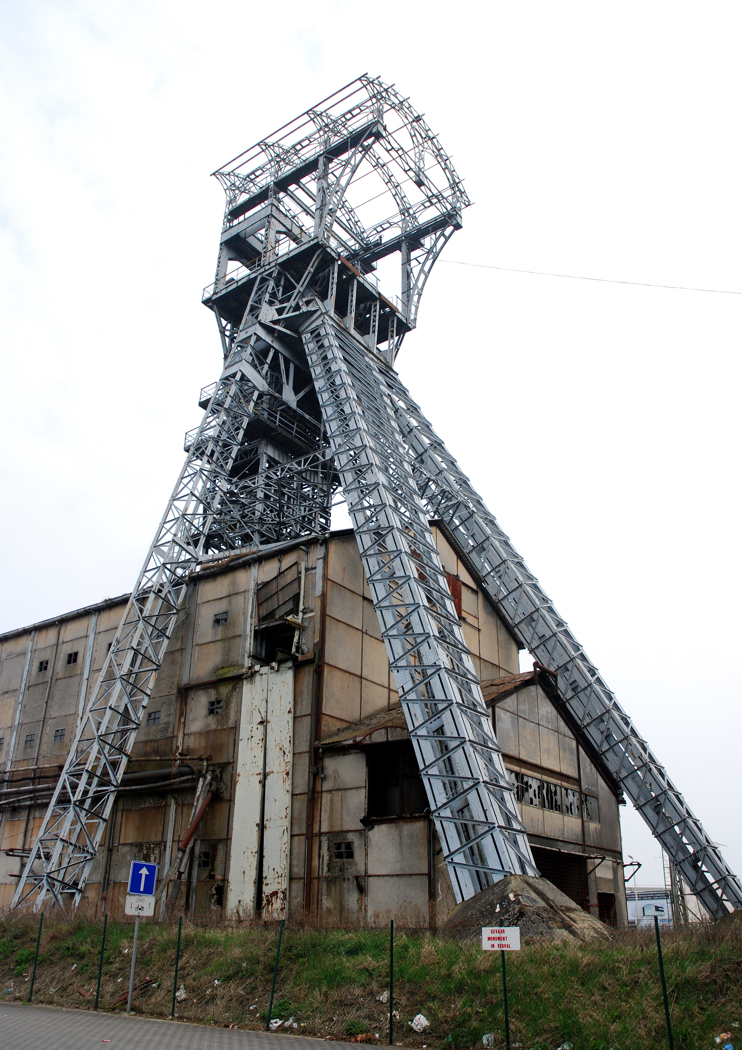 de schachtbok van de steenkoolmijn van Zolder, België